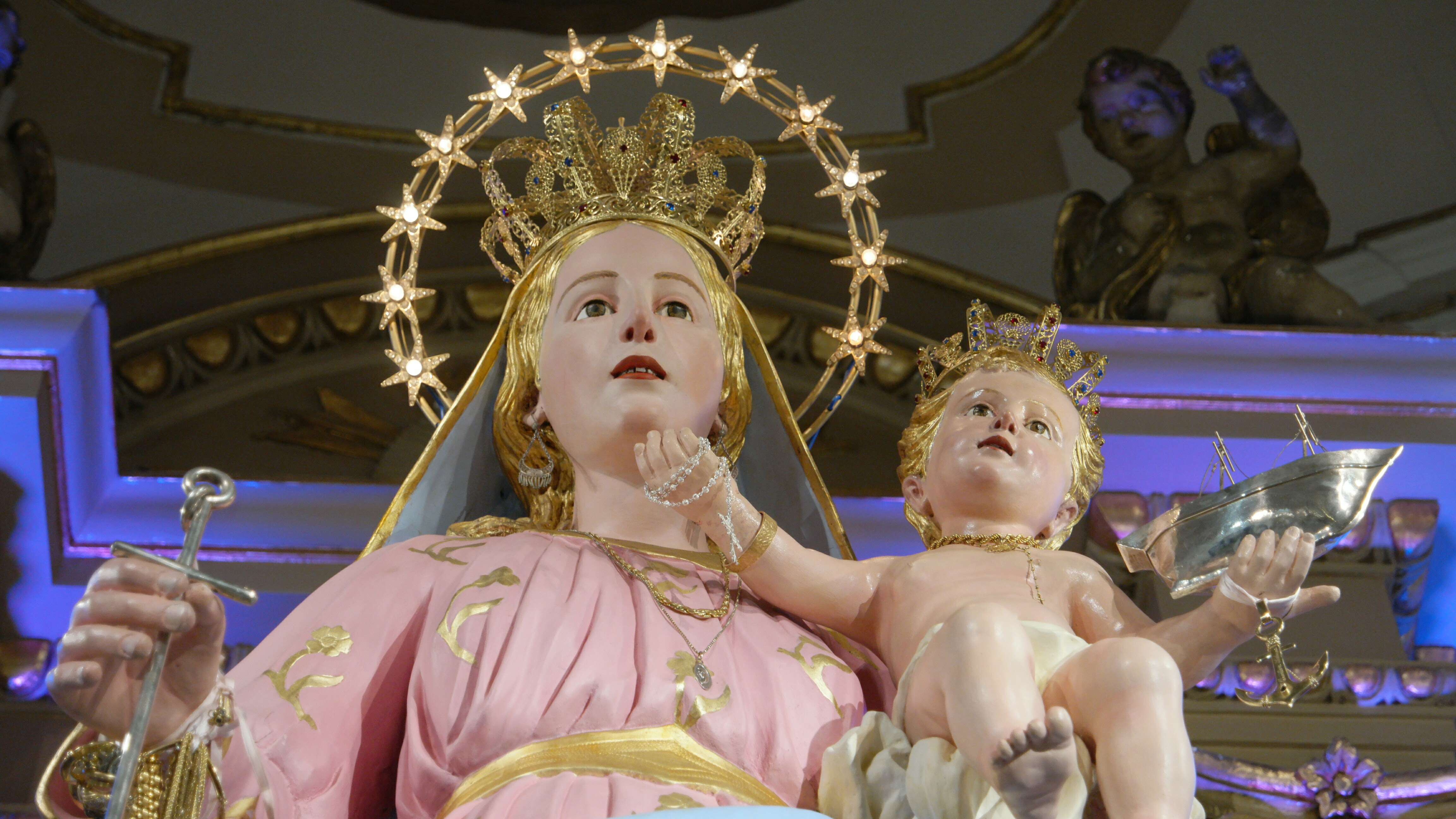 Statua dedicata alla Madonna della Buona Nuova in Acitrezza.